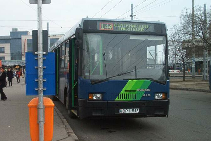 Gyors 144-es jelzésű Ikarus 415-ös busz az Örs vezér terén